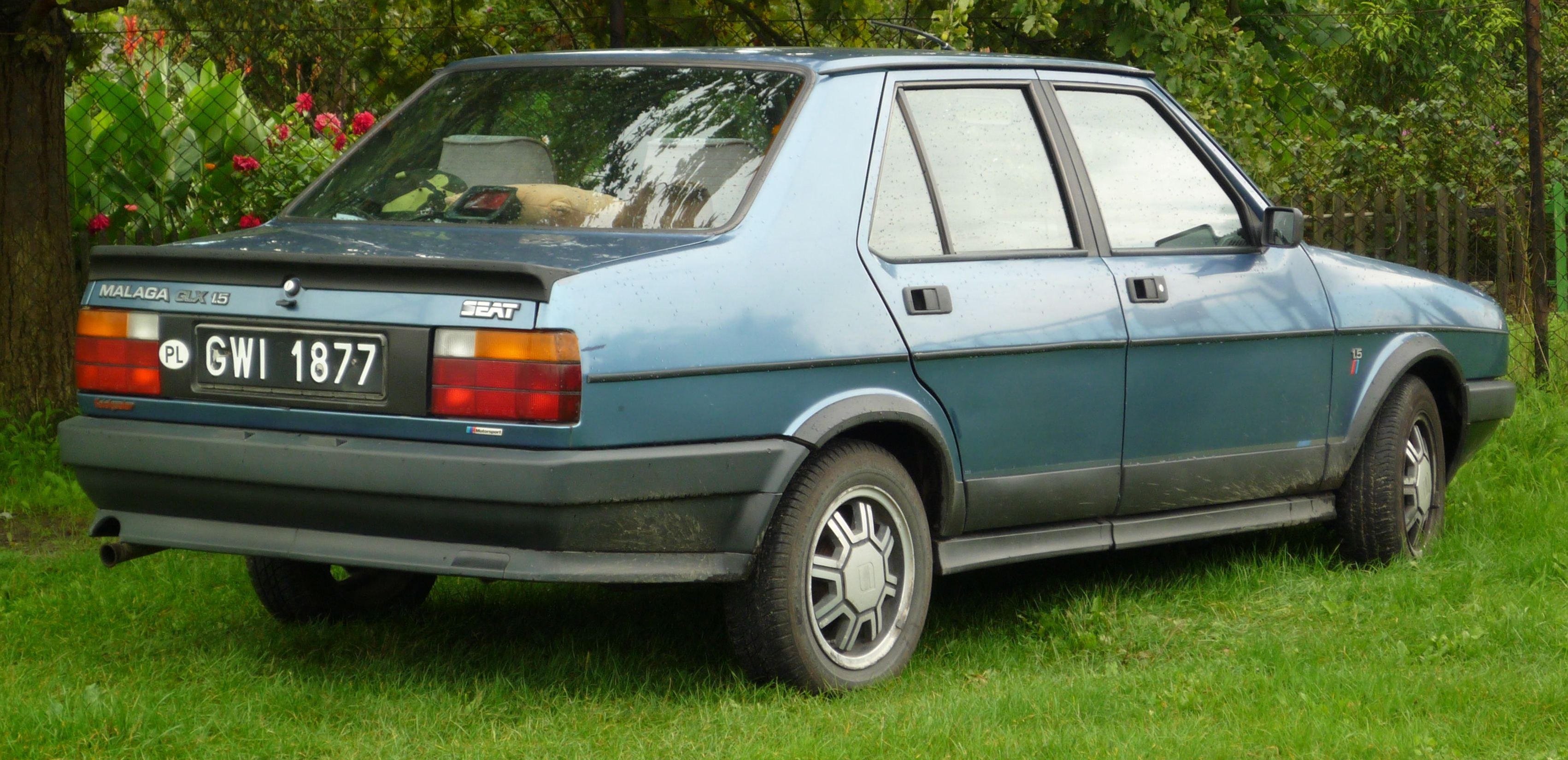 SEAT Málaga w Słubicach.